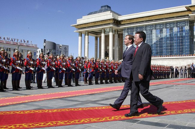 Церемония официальной встречи Президента России Дмитрия Медведева.